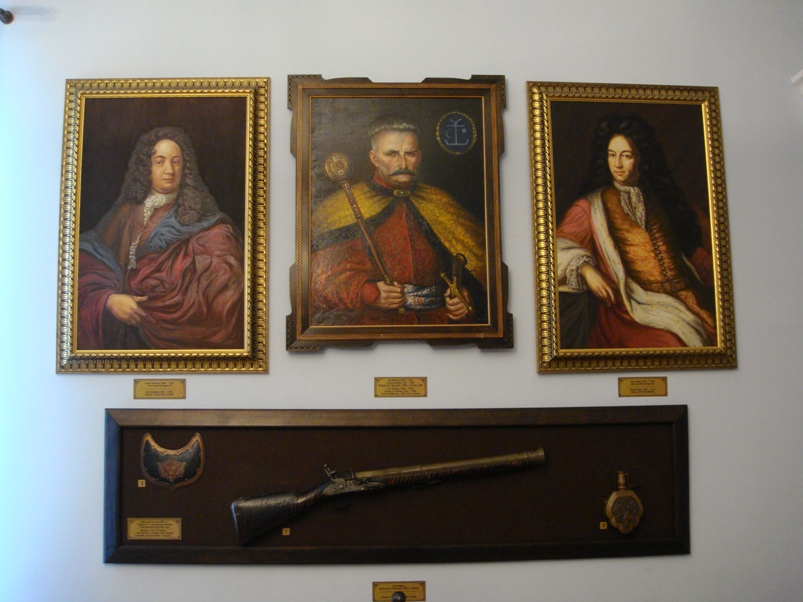 Иван Мазепа - герой Полтавской битвы (фото в экспозиции музея Полтавской битвы).